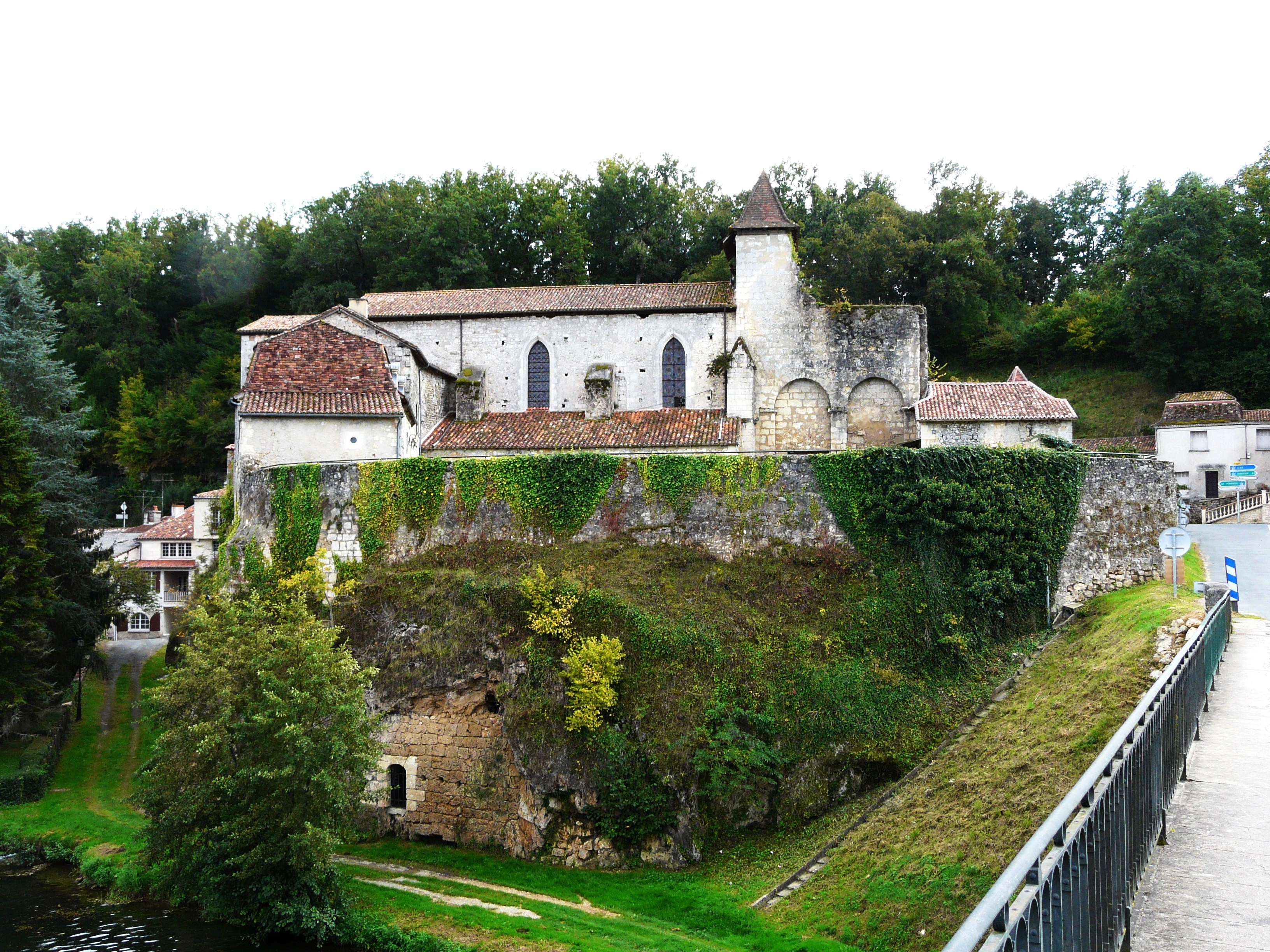 L'église Saint-Pierre et Saint-Paul, Sourzac, Dordogne, France